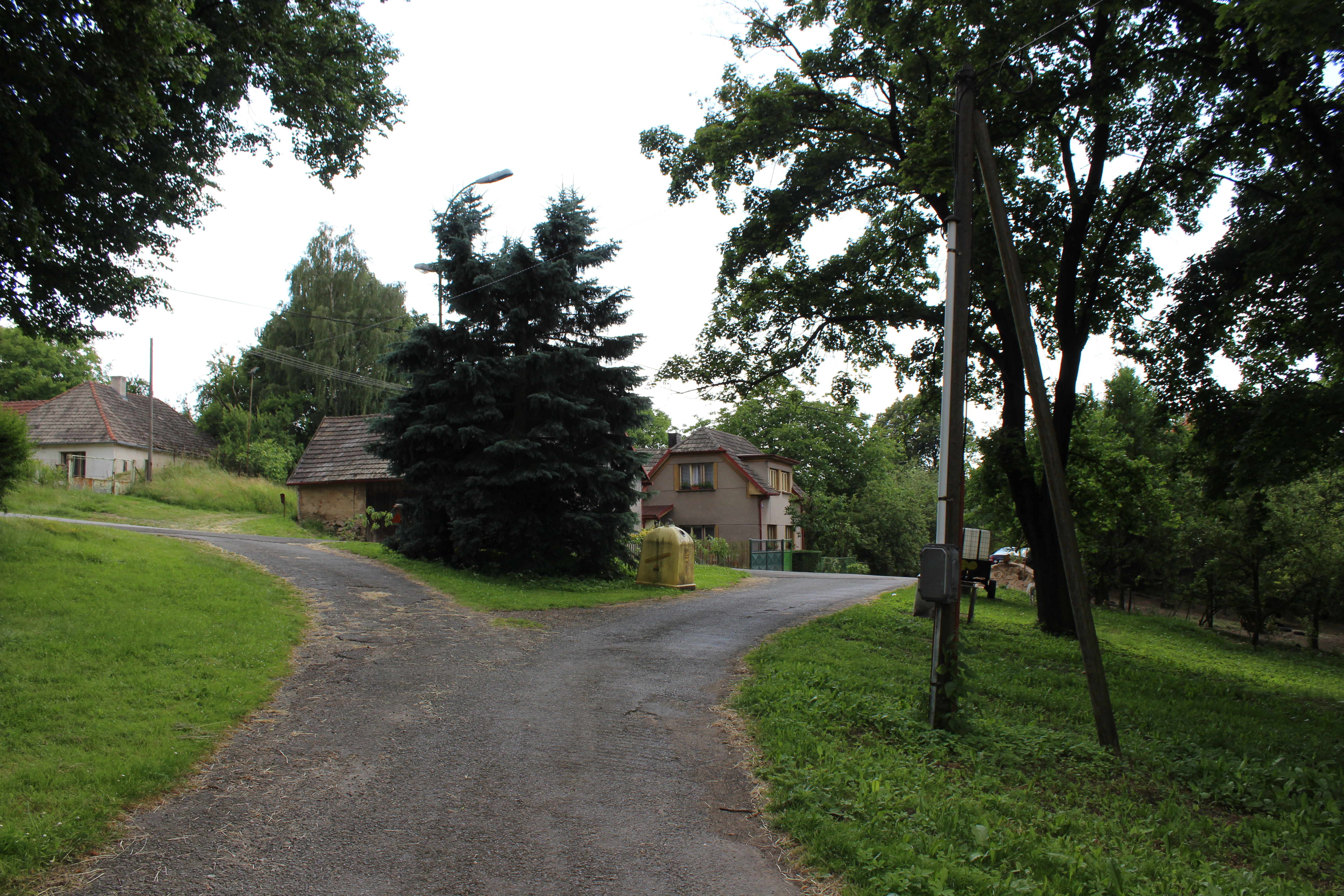 Pohled na křižovatku v Malé Pasece od severovýchodu.